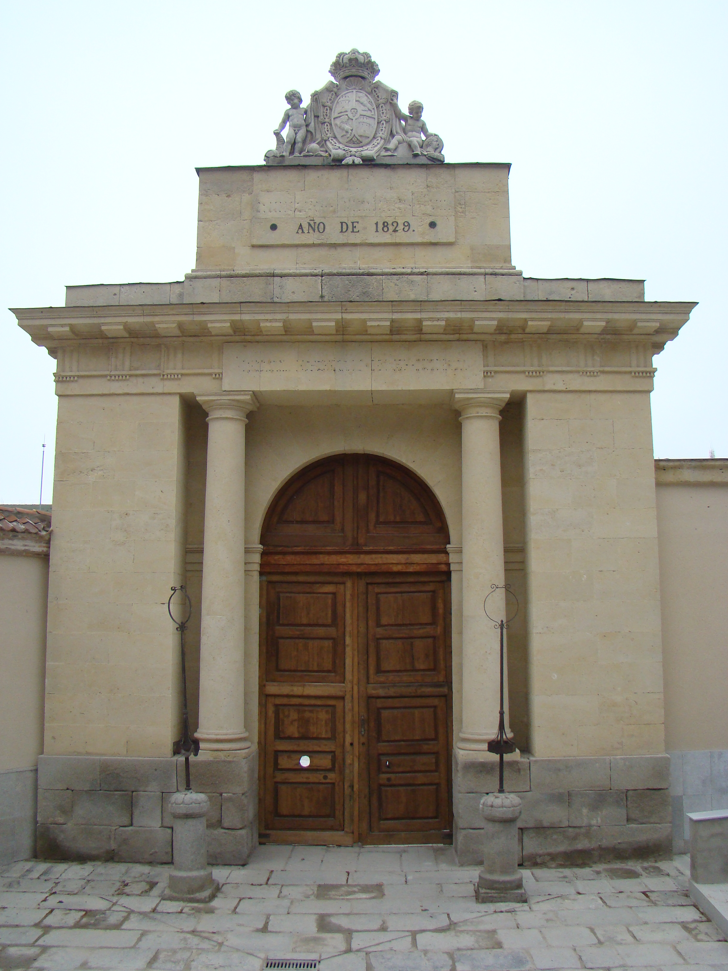 Entrada a la Casa de la Moneda (restaurada) en la ciudad española de Segovia.